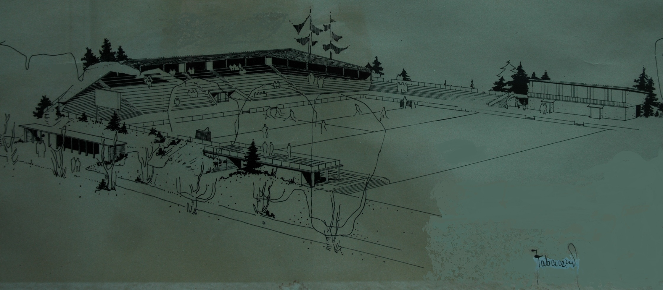 Projekt Ansicht Kunsteisbahn Zelgli Winterthur von ©Jakob Tabacznik, dipl. Arch. ETH/SIA 1956